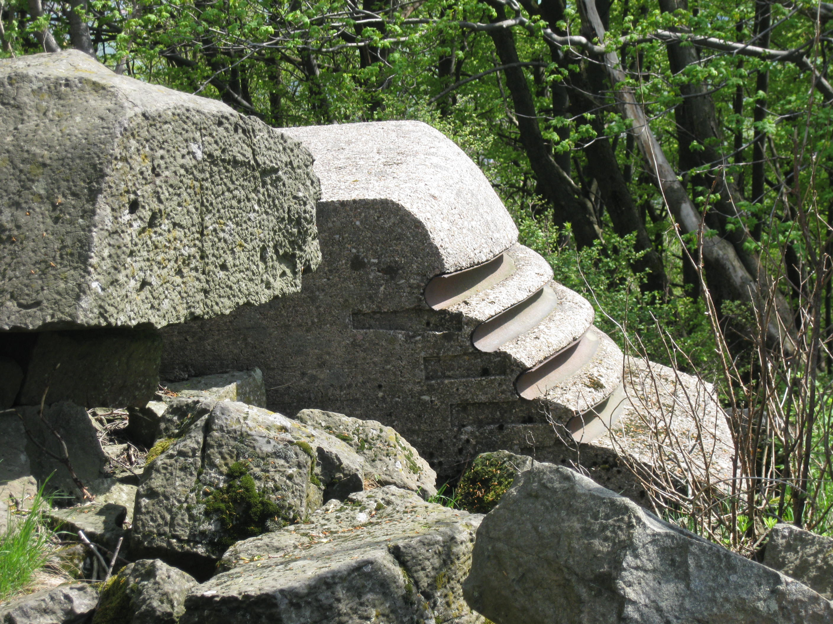 Einer der Steine, mit denen die Kabel an der Kalbe gehalten wurden